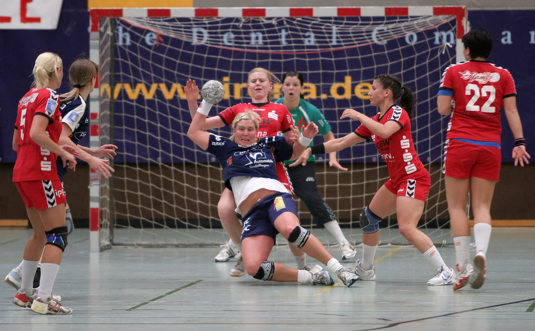 Maja Sommerlund, dänische Handballspielerin vom VfL Sindelfingen, während des Play-Off-Finalspiels zwischen der HSG Bensheim/Auerbach und dem VfL Sindelfingen am 16. Mai 2009 in der Bensheimer Weststadthalle.